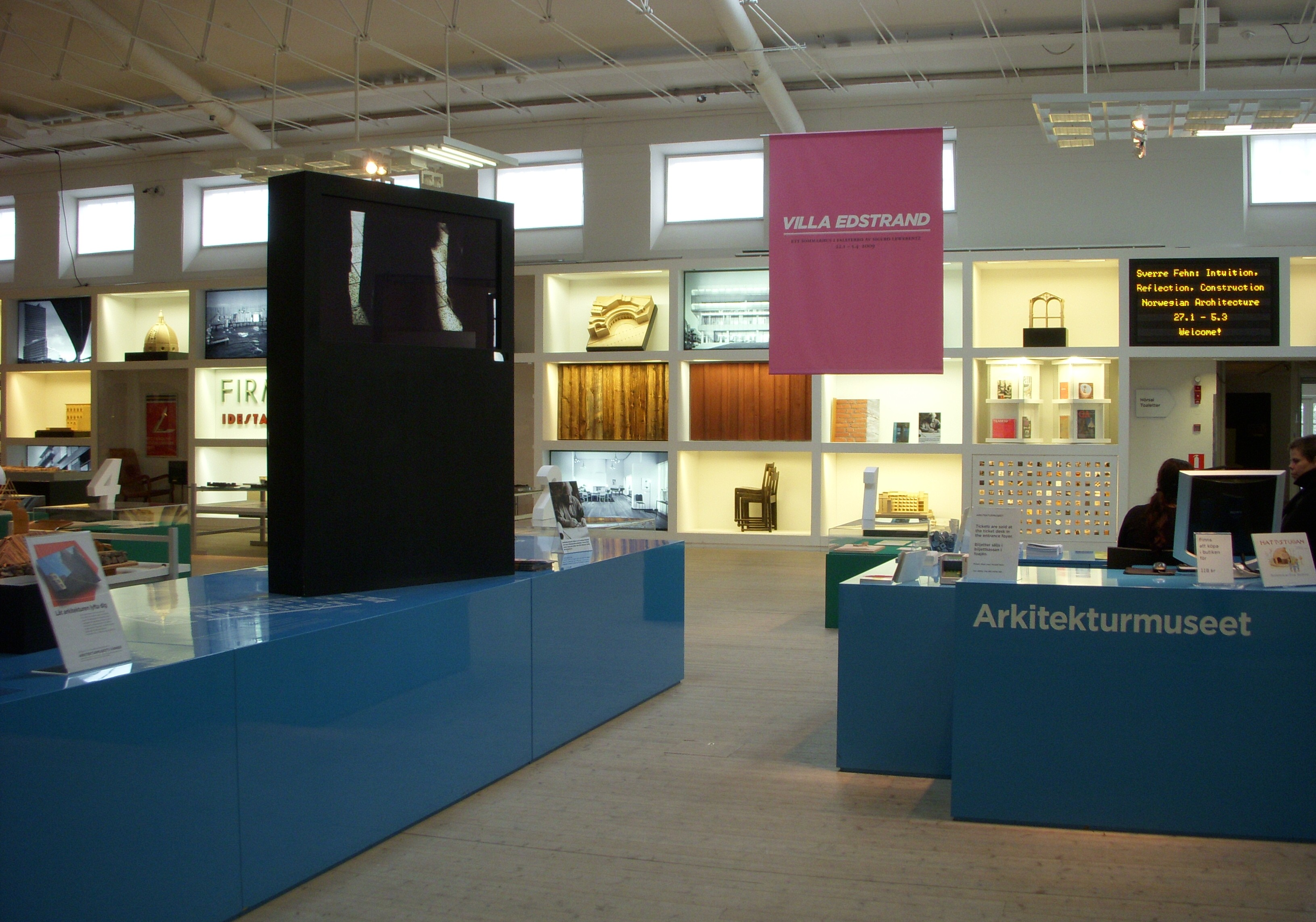 Arkitekturmuseet i Stockholm, entrén